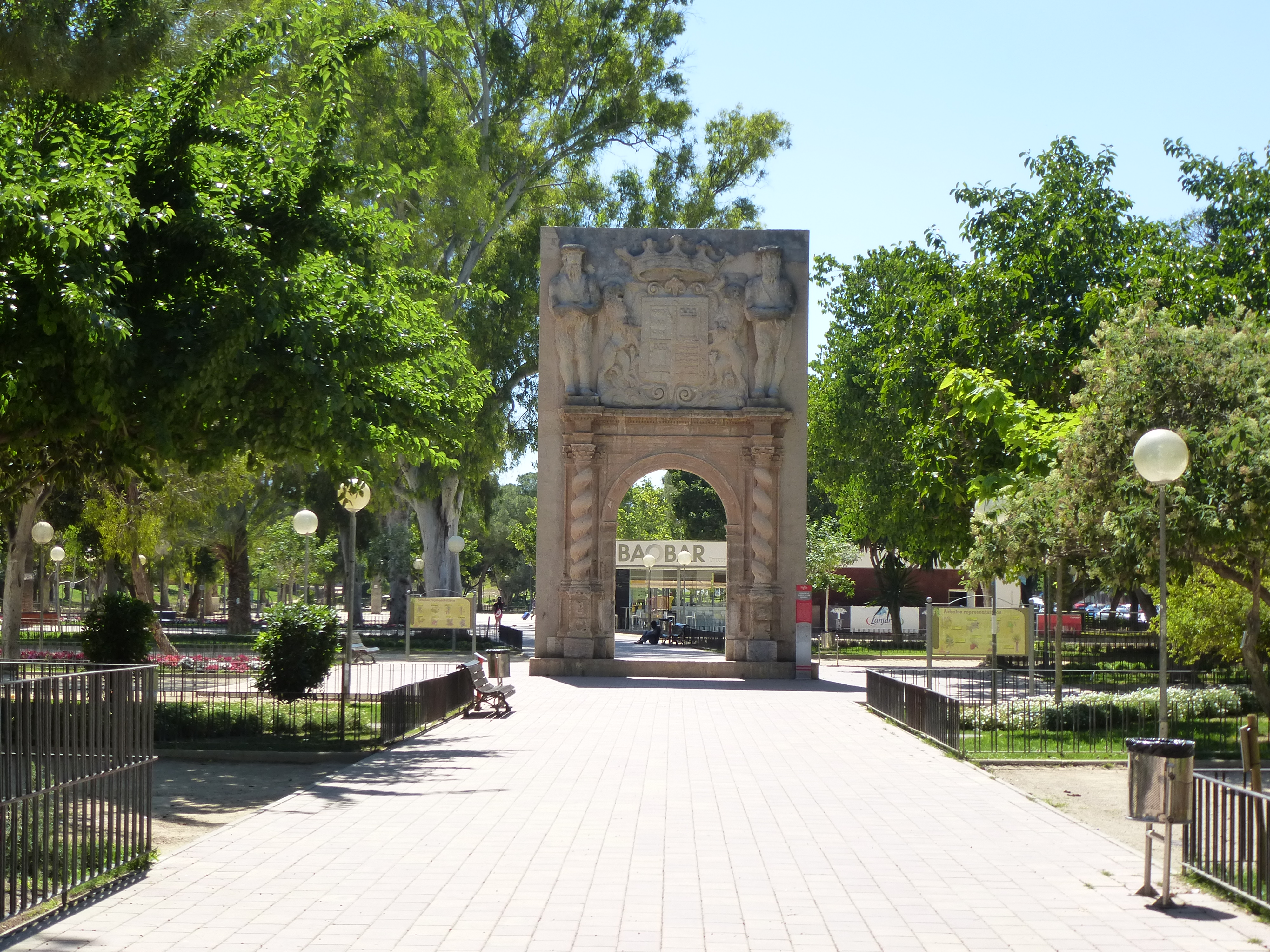 le jardin du malecon